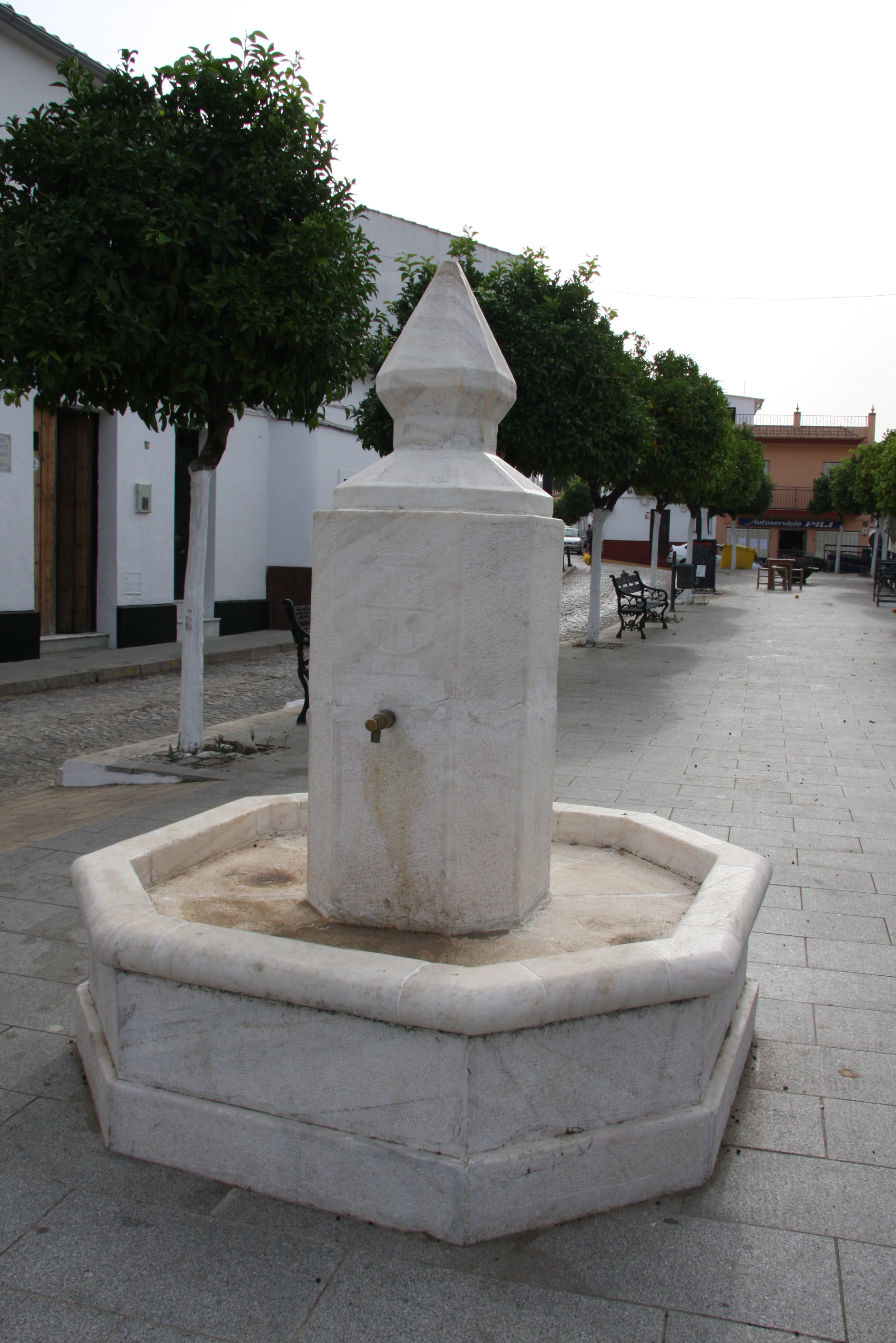 Fuente del Reloj en Almadén de la Plata